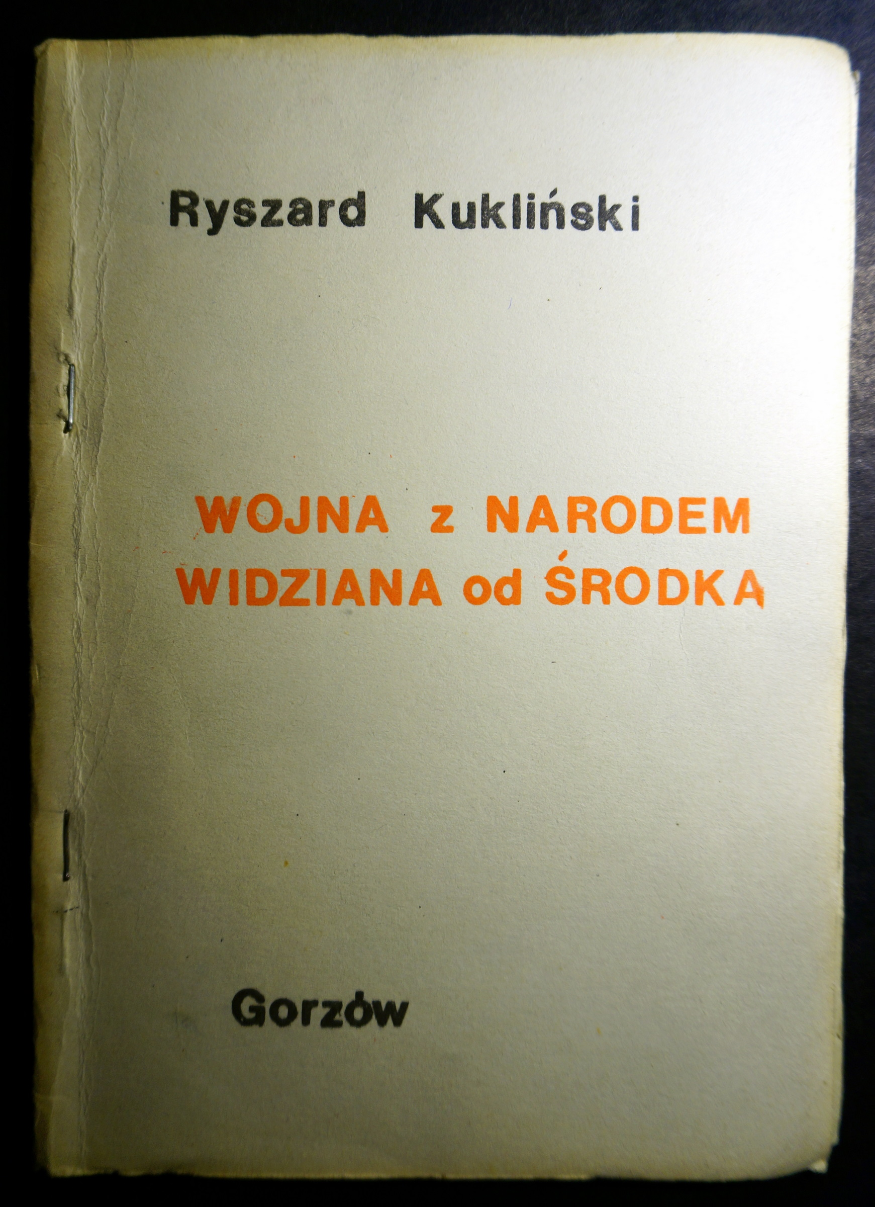 Rozmowa z R. J. Kuklińskim, w piątą rocznicę wprowadzenia stanu wojennego ( przedruk z paryskiej Kultury ). Wydawnictwo podziemne, Gorzowska Oficyna Wydawnicza 1987 r.